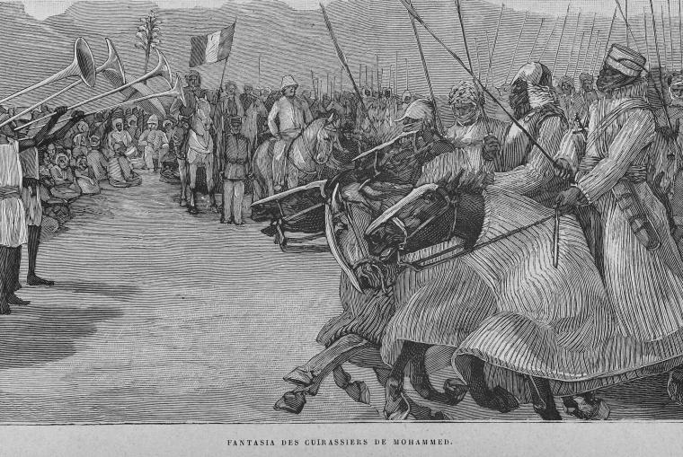 Fantasia des cuirassiers de Mohammed. From Nos africains : la Mission Crampel, la mission Dybowski, la mission Mizon, la mission Monteil, la mission Maistre, le Soudan, le Dahomey, les missions soudanaises, le seconde mission Mizon et les puissances européennes dans l'Afrique centrale, le Congo franais, Obock, le Soudan francais, la Côte d'Ivoire, le Sud-algérien, les cables sous-marins, quelques remarques / Harry Alis (published 1894).